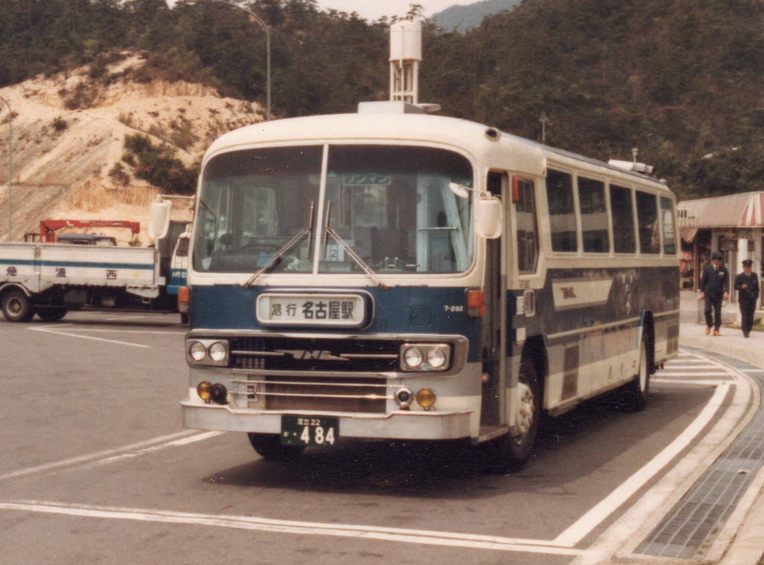 1981年 撮影場所失念